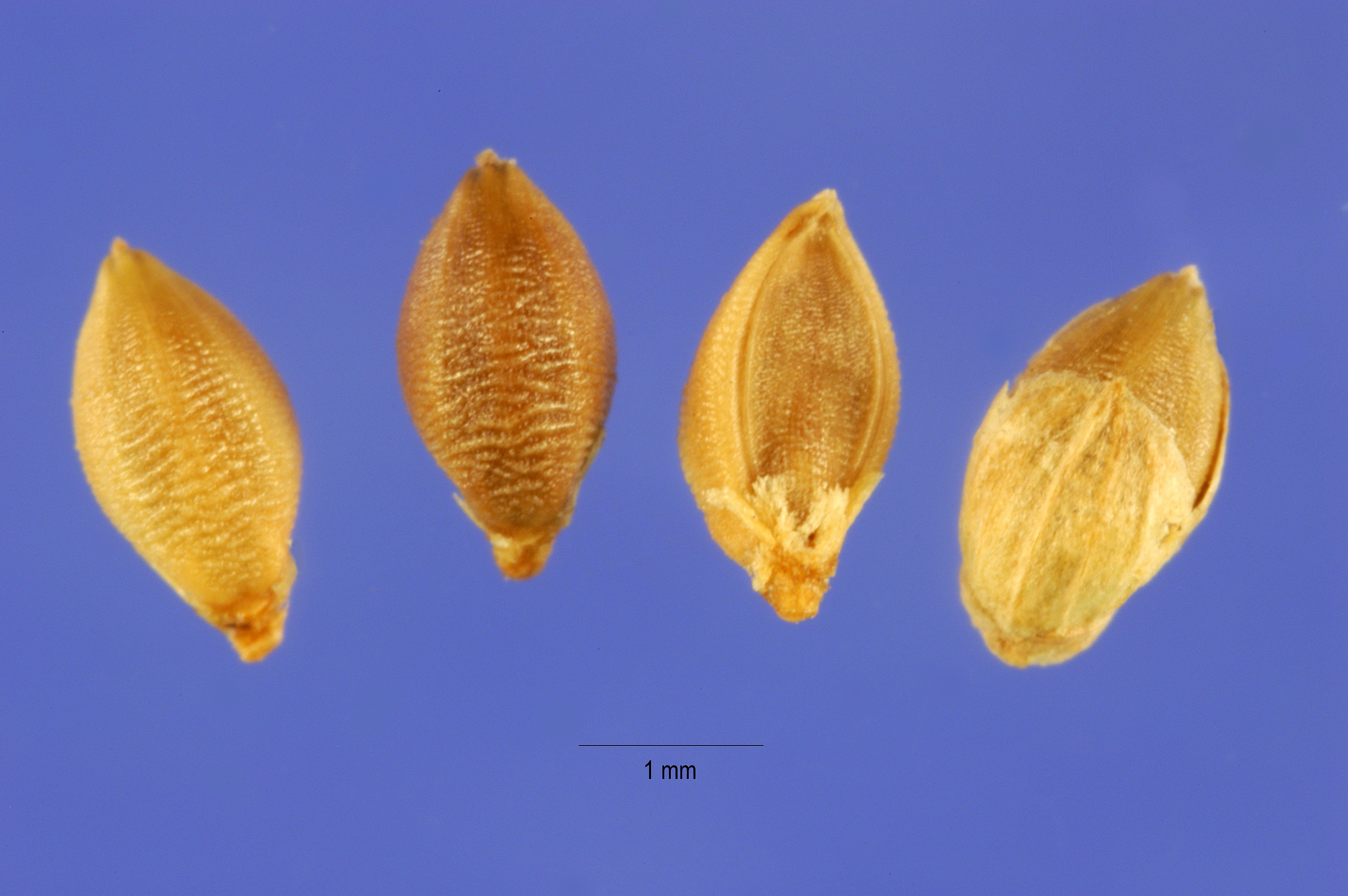 Setaria vulpiseta (Lam.) Roem. & Schult. plains bristlegrass